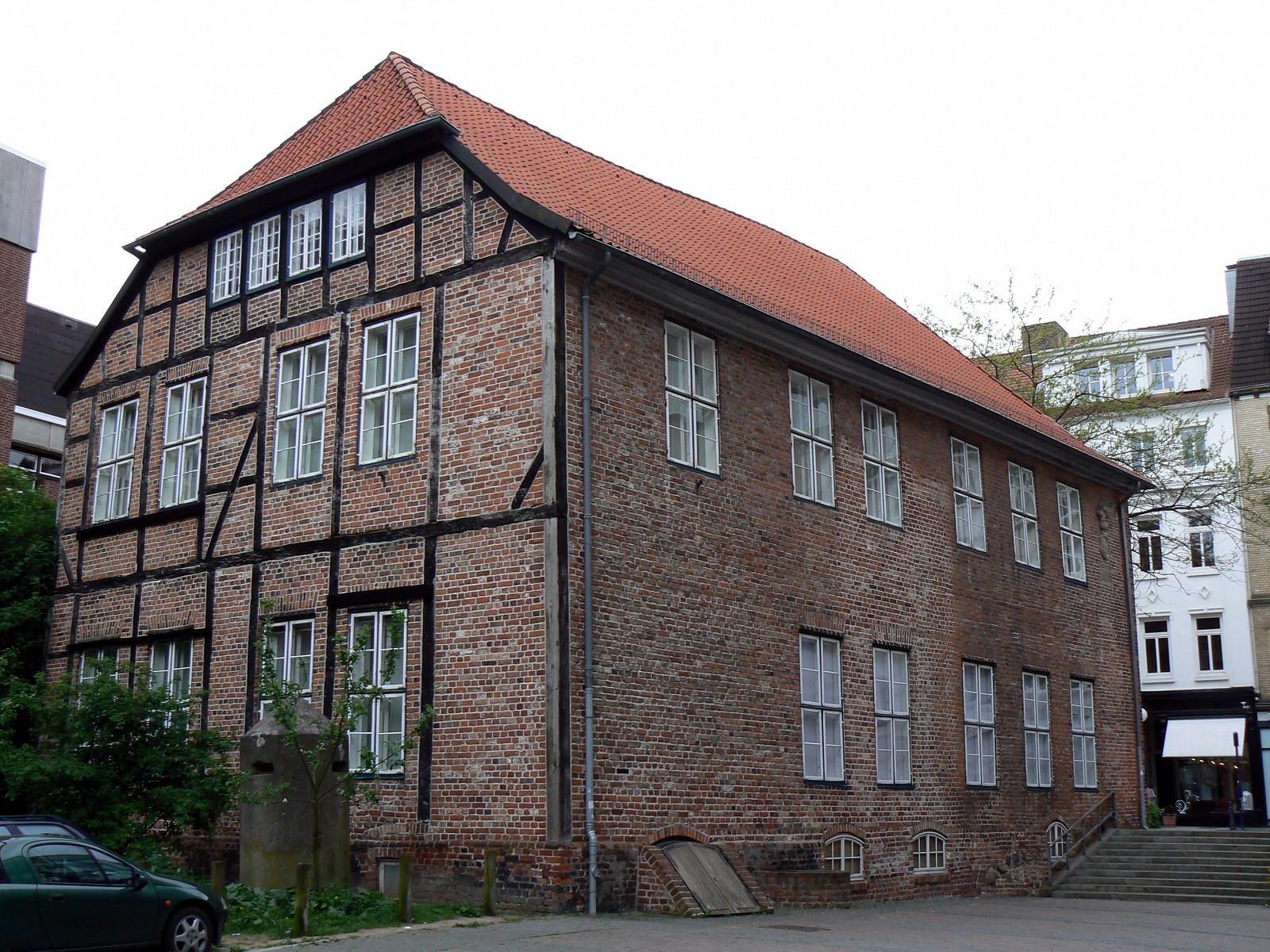 Rückseite des Warleberger Hofs - Der einzig erhaltene Adelshof in Kiel. Erbaut 1616, seit 1970 Teil des Kieler Stadtmuseums.